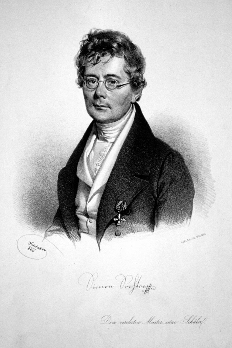 Austrian musicologist and componist Simon Sechter, Lithographie von Joseph Kriehuber, 1840